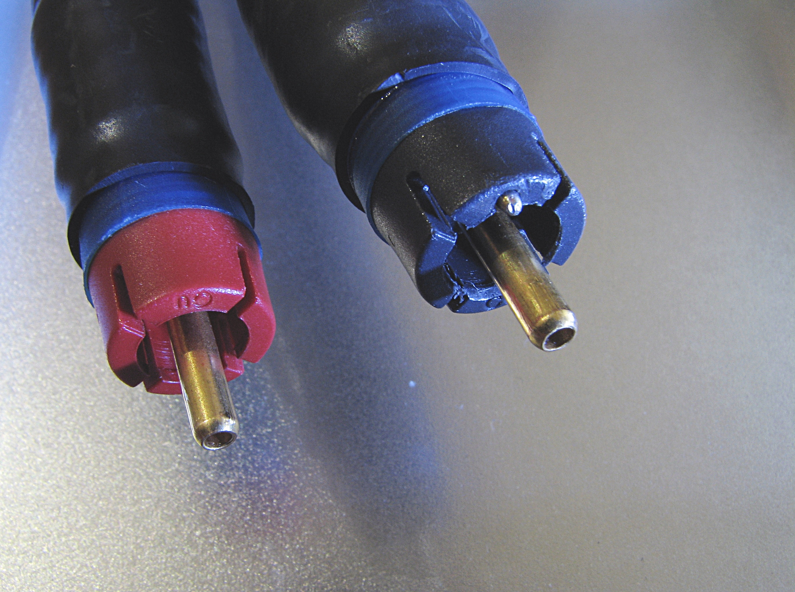 Eichmann: Boutique RCA bullet connector (lacks good sleeve contact surface)